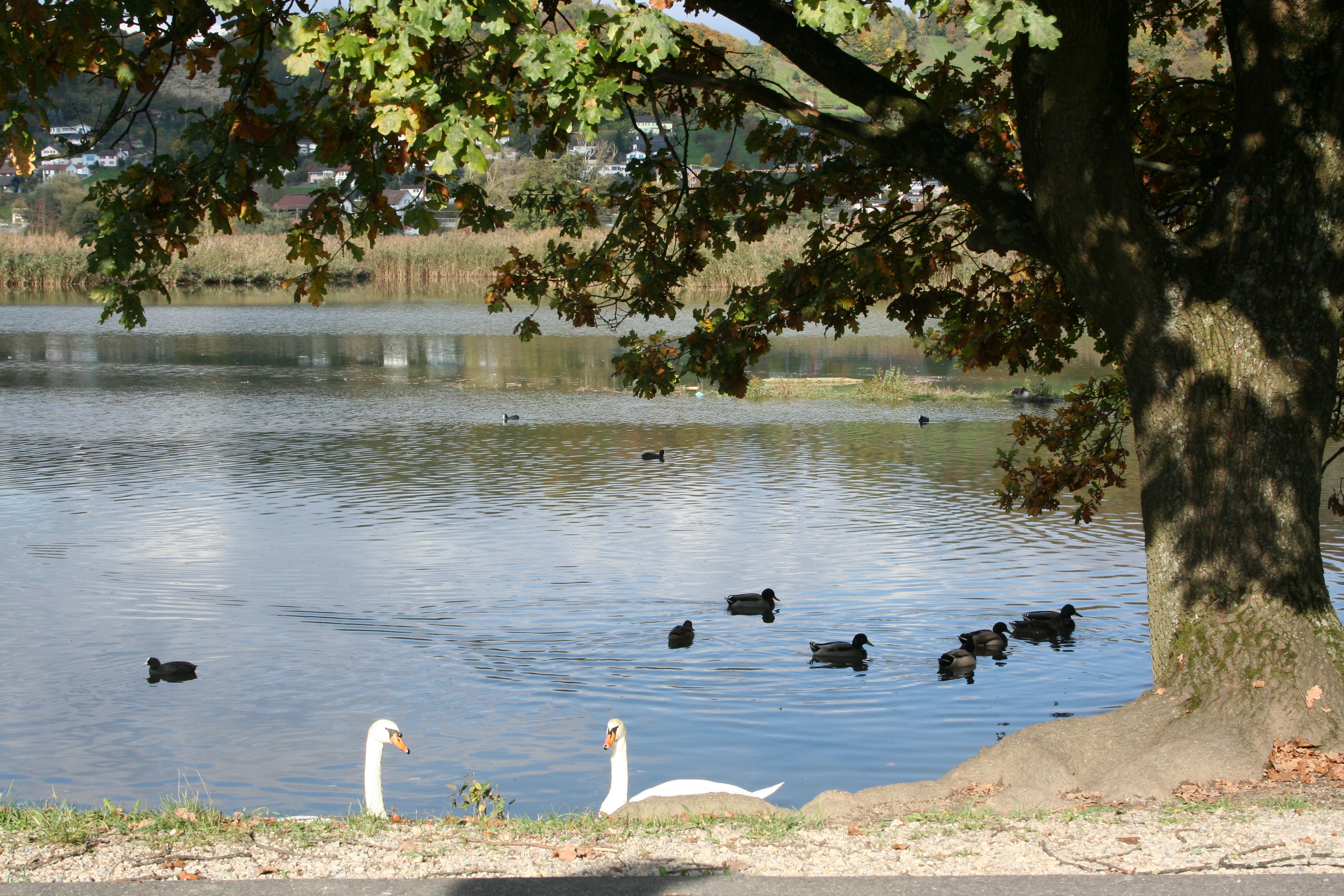 Klingnauer Stausee